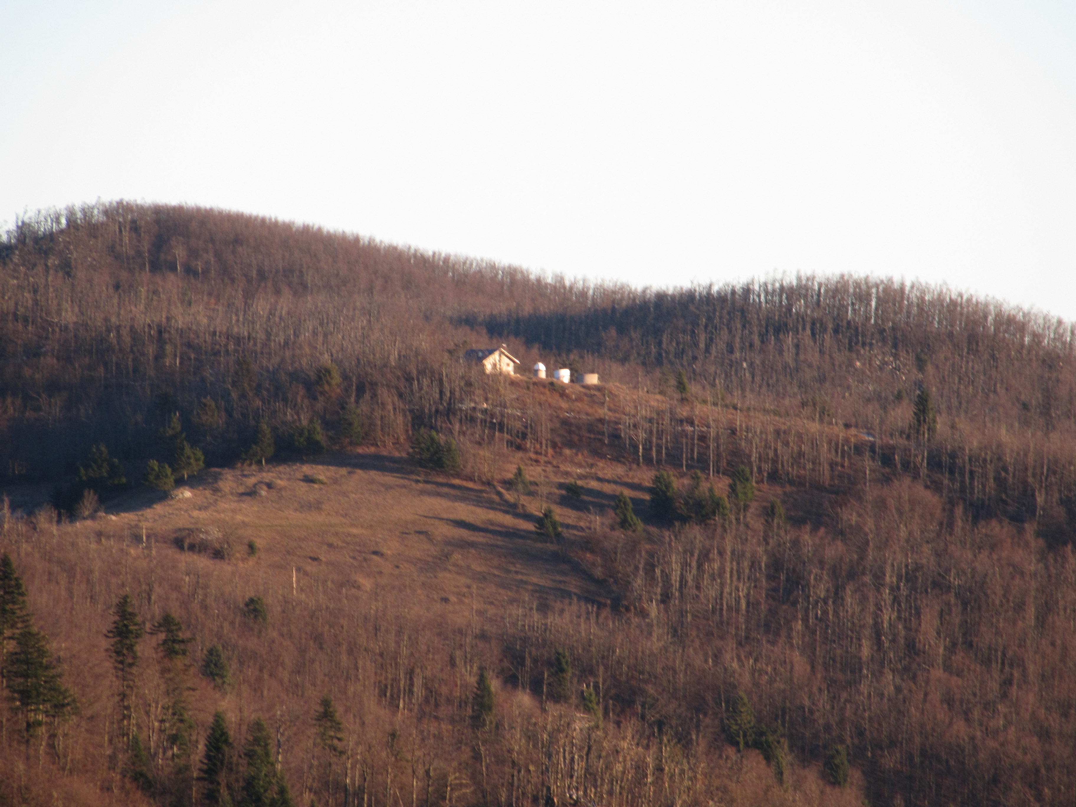 Pogled iz Zajčevega griča (črtež, Strmec 11) na astronomski observatorij Javornik. Na hribu Zajcev grič je tudi trigonometrična točka.